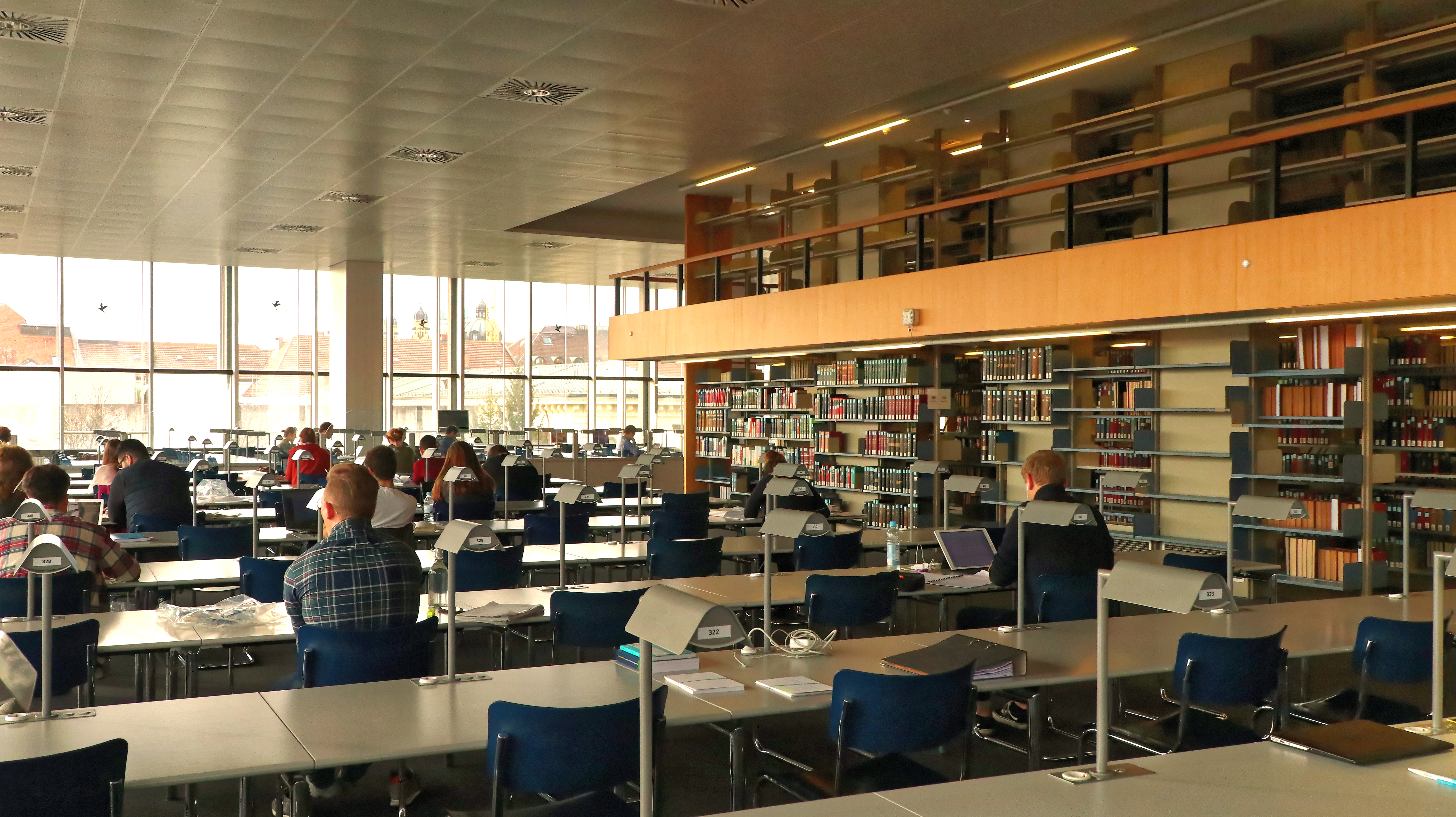 Restauriertes Treppenhaus mit Poster zur Sonderausstellung in der BSB